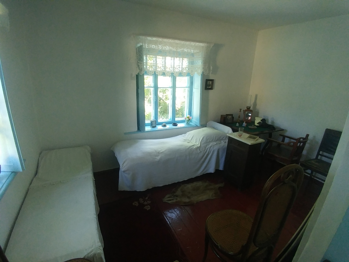 Музей А.С. Грина в Старом Крыму. Комната, в которой писатель умер в 1932 году.